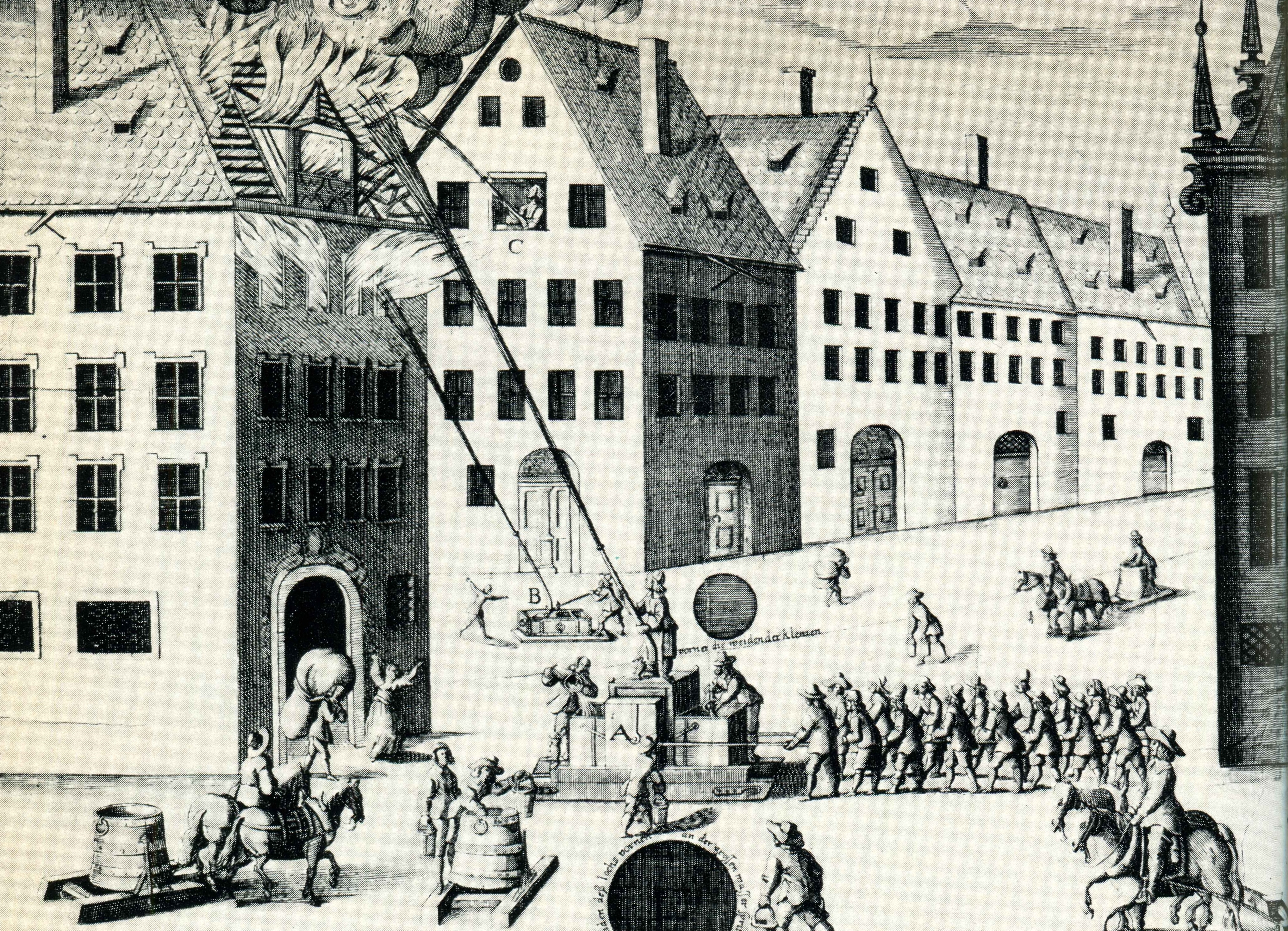 Feuer-Löschmaschine, erfunden von Hans Hautsch